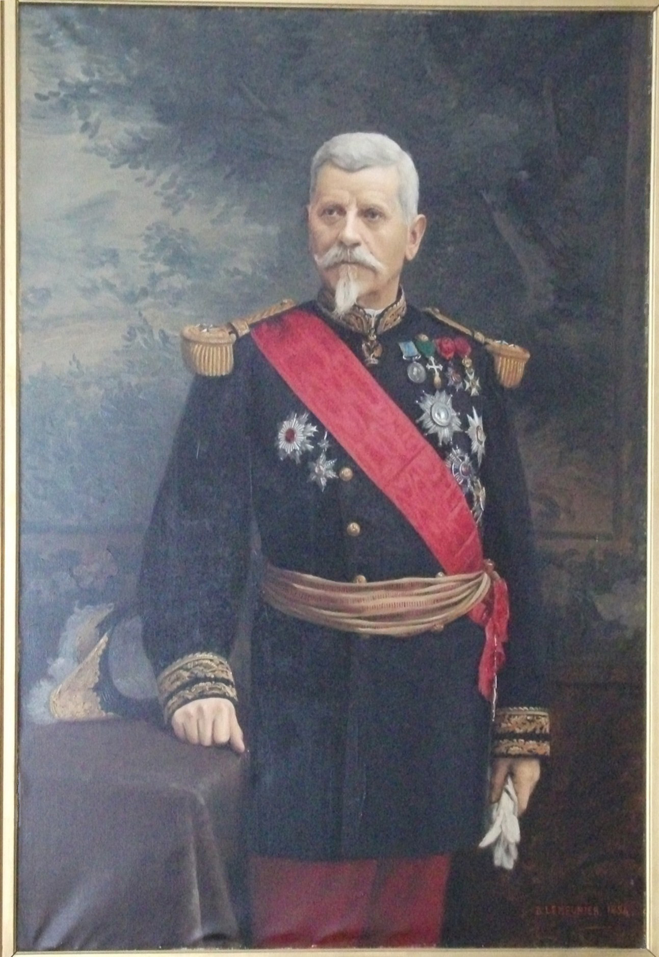 Portrait de Félix Antoine Appert (1891-1817)